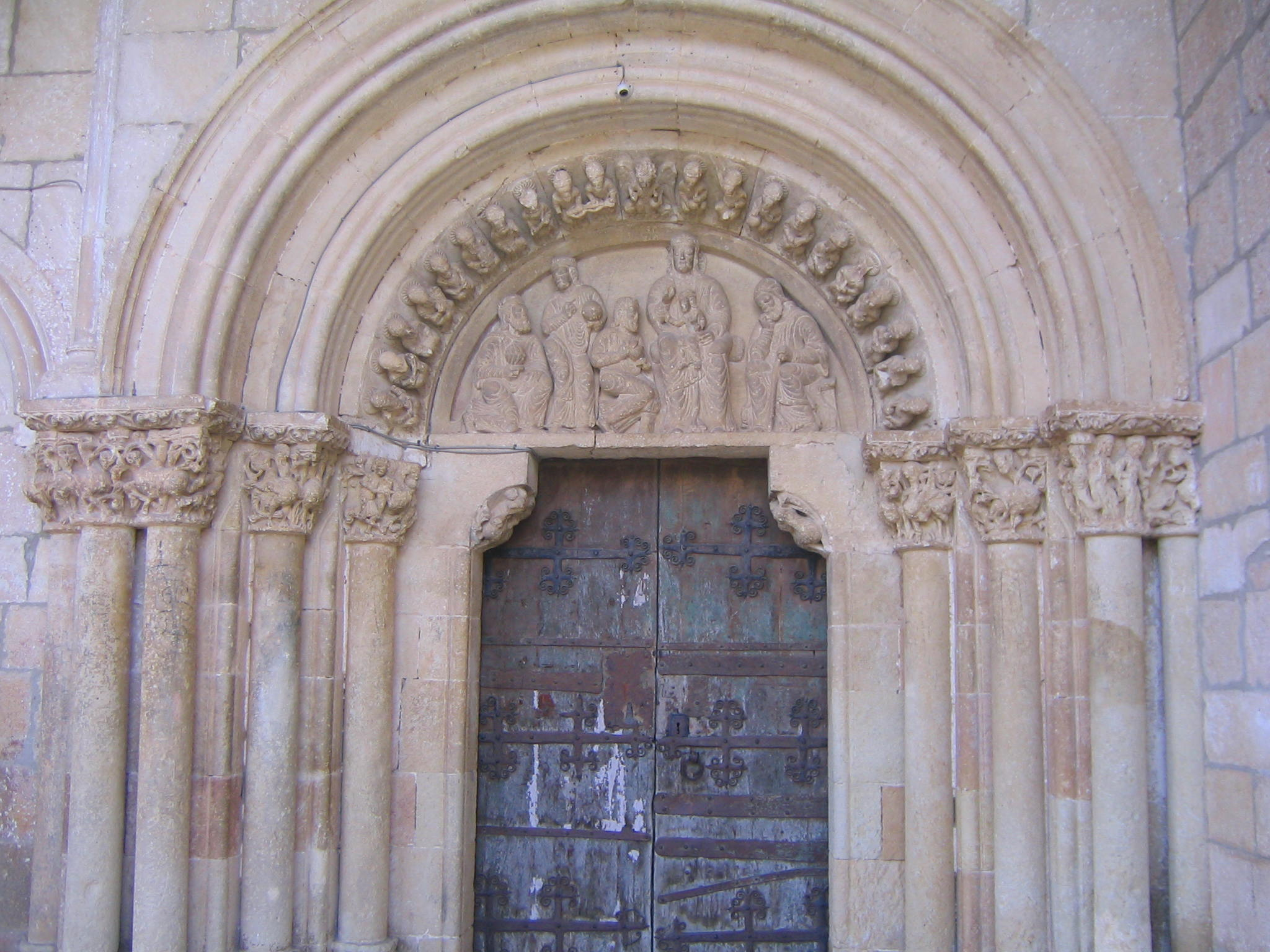 Ahedo de Butrón, Merindades, Burgos, tímpano Adoración de los Reyes Magos